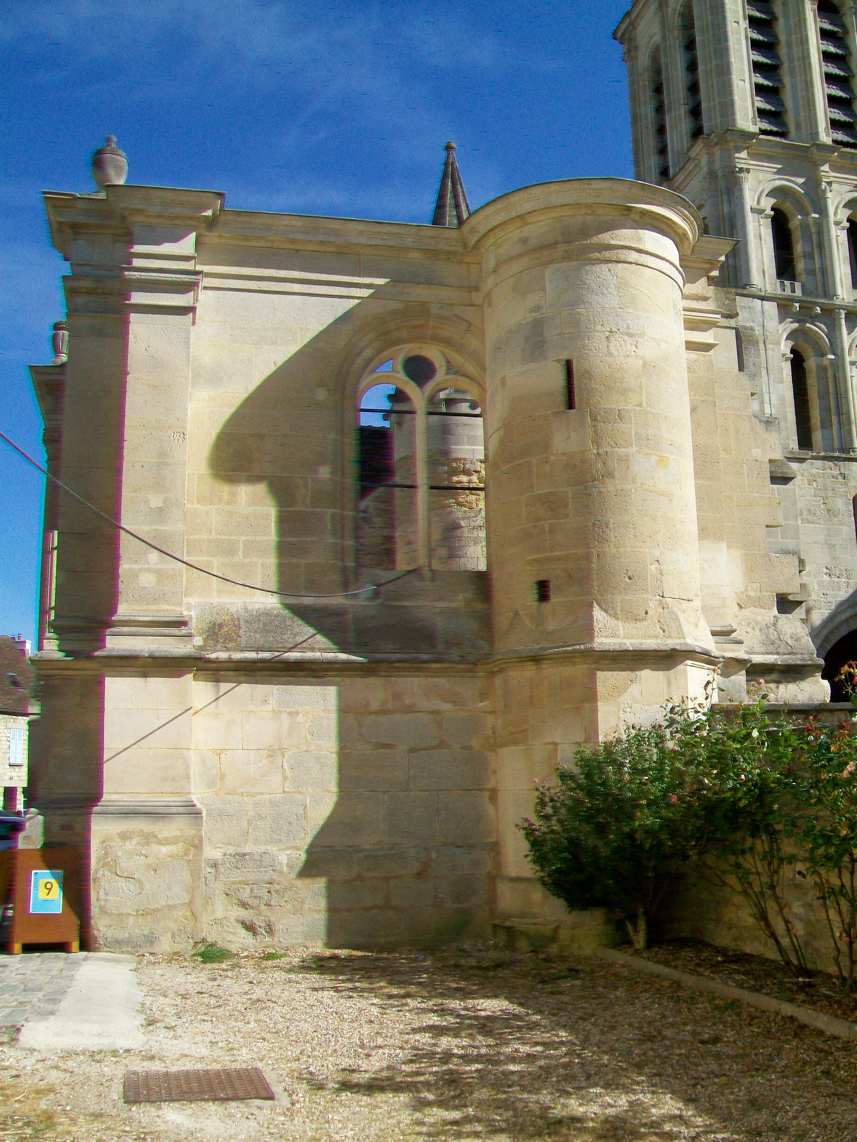 L'extentsion Renaissance inachevée ; vue depuis l'ouest.